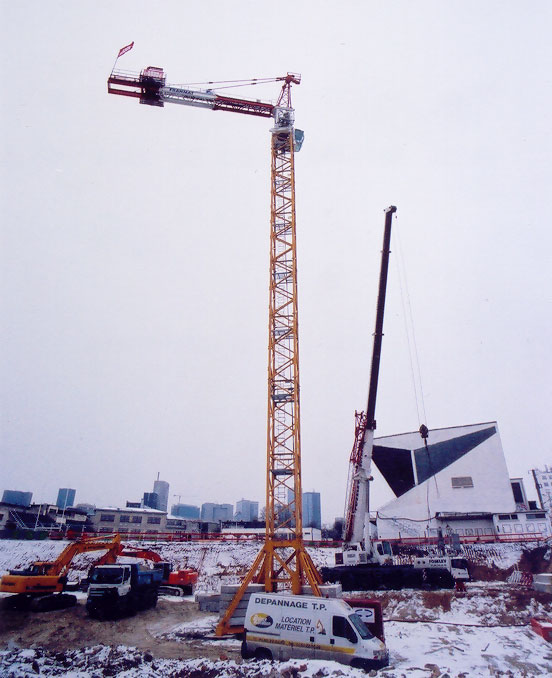 Montage d'une grue (FR) Édouard BERGÉ (c) 2005